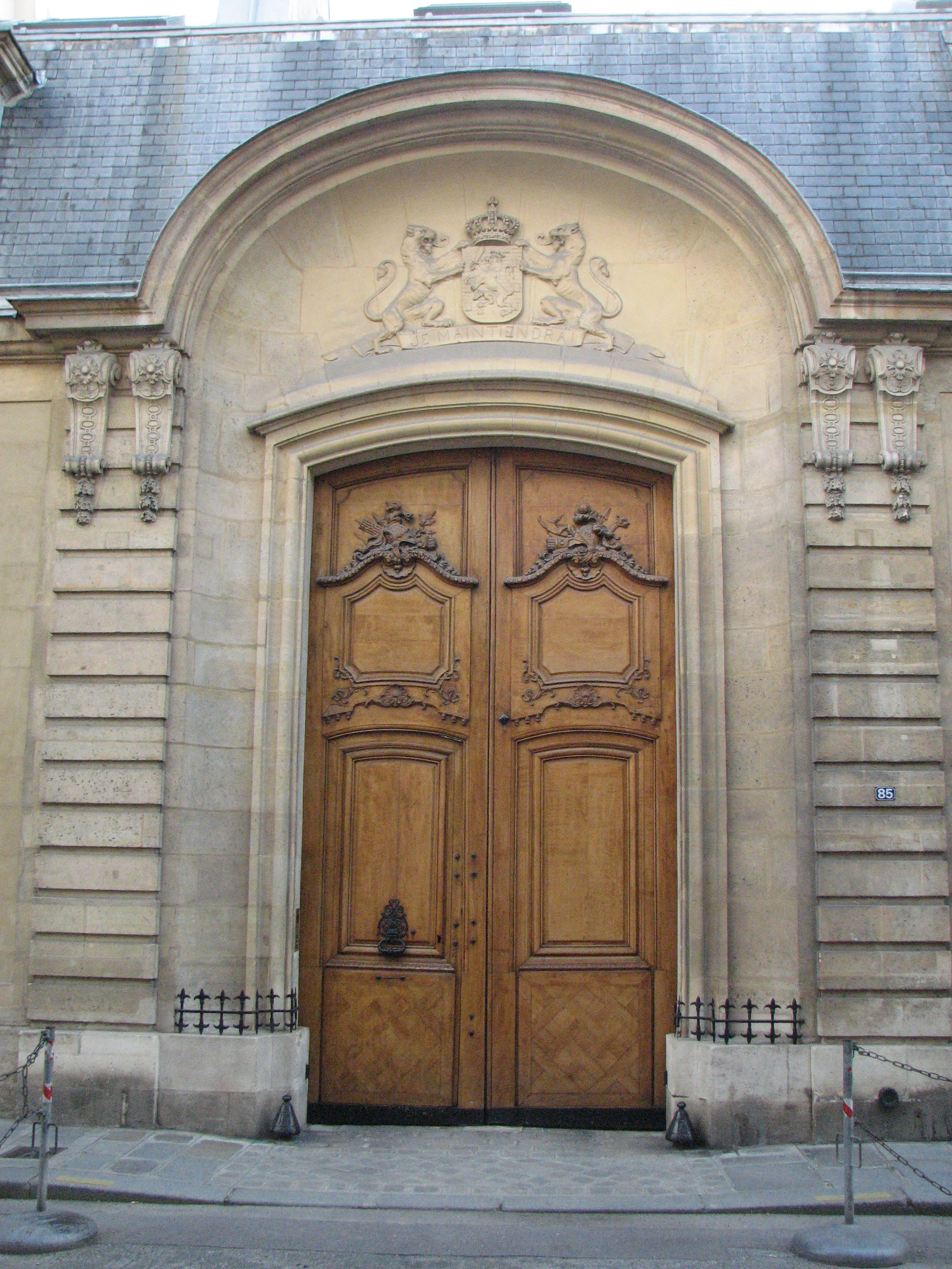 Porche de l'hôtel d'Avaray au 85 rue de Grenelle dans le 7e arrondissement de Paris et ambassade des Pays-Bas